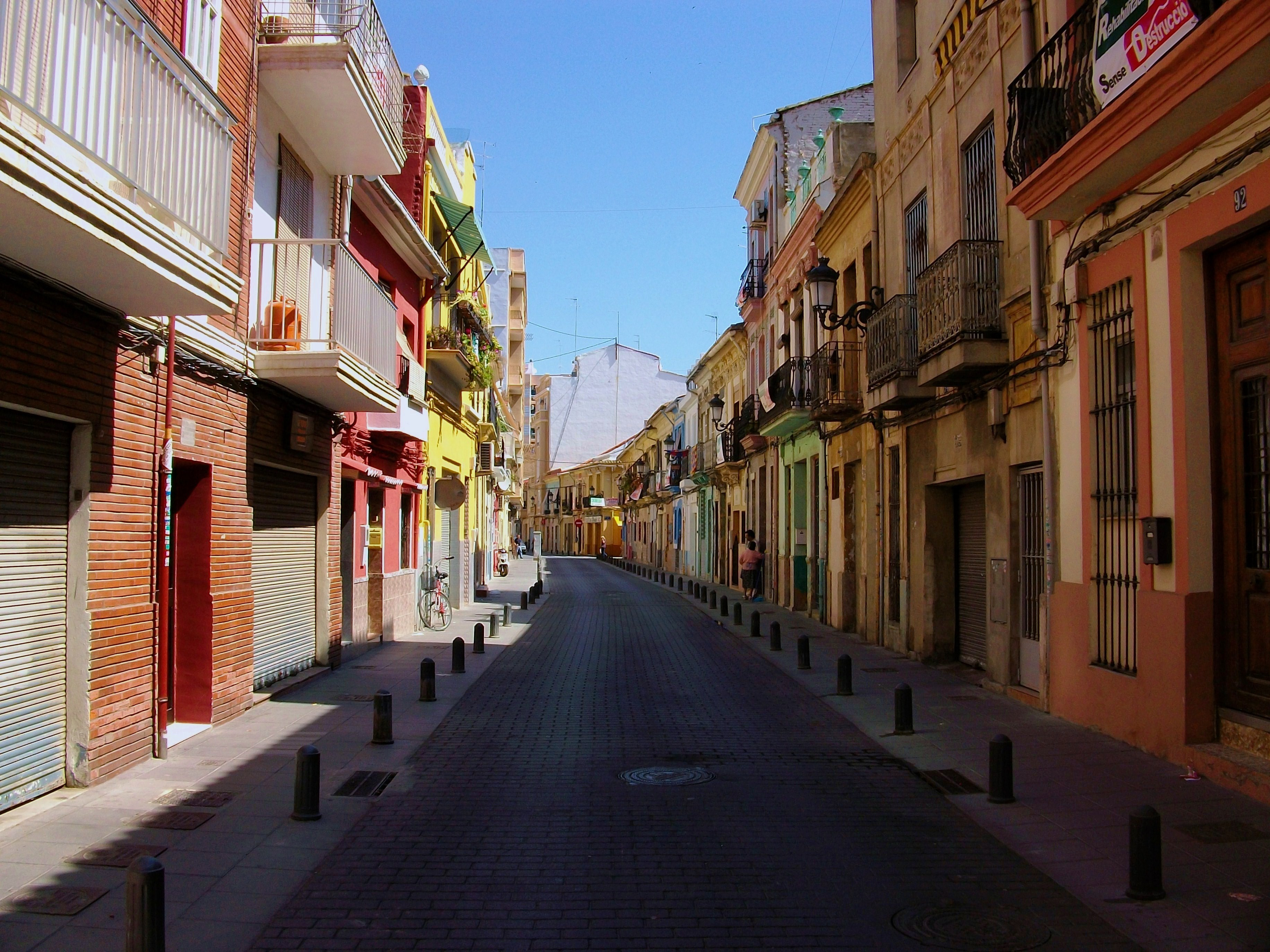 Carrer del Rosari del Cabanyal.